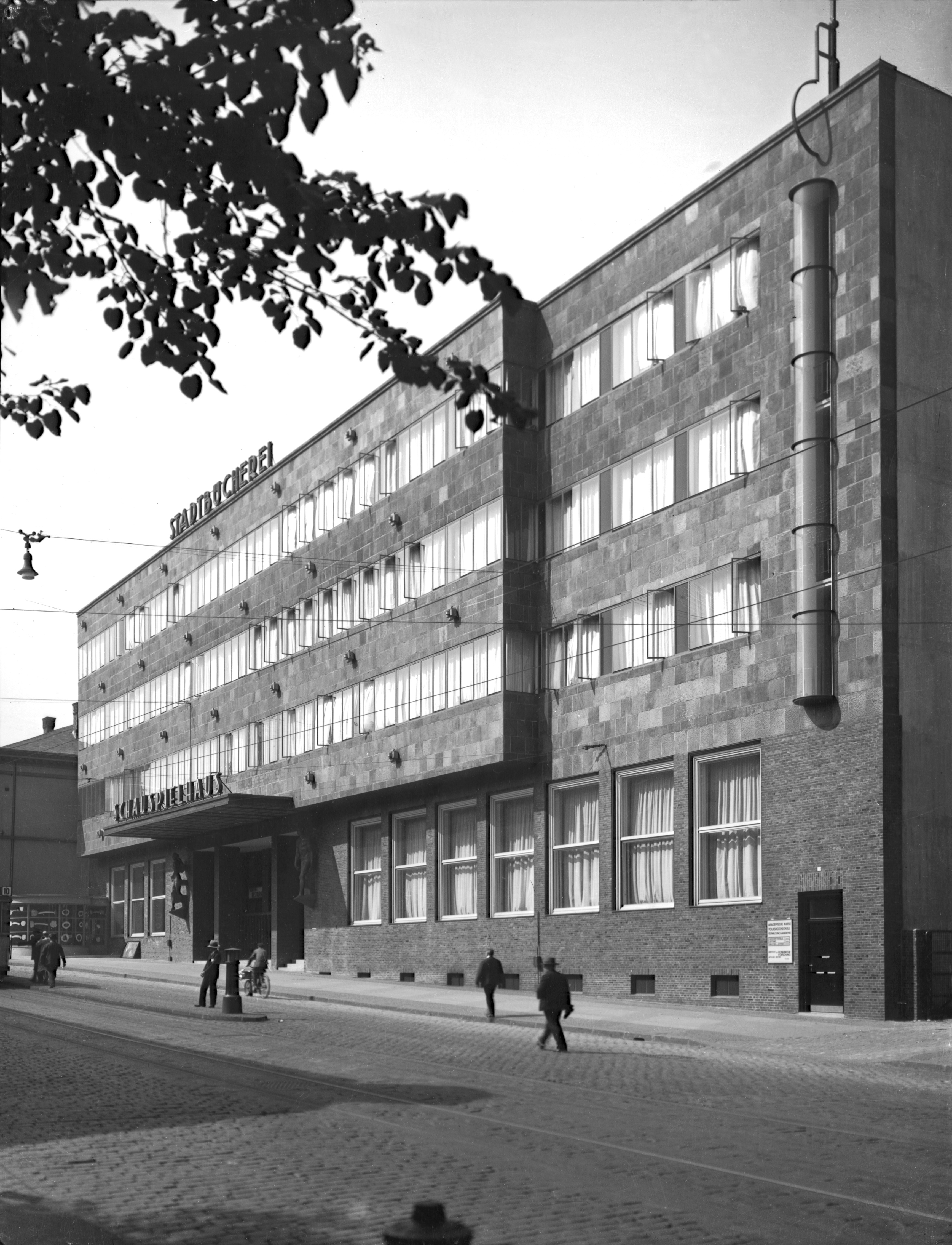 Gebäude der Stadtbücherei in Essen, Hindenburgstraße 45, erbaut 1928-1930